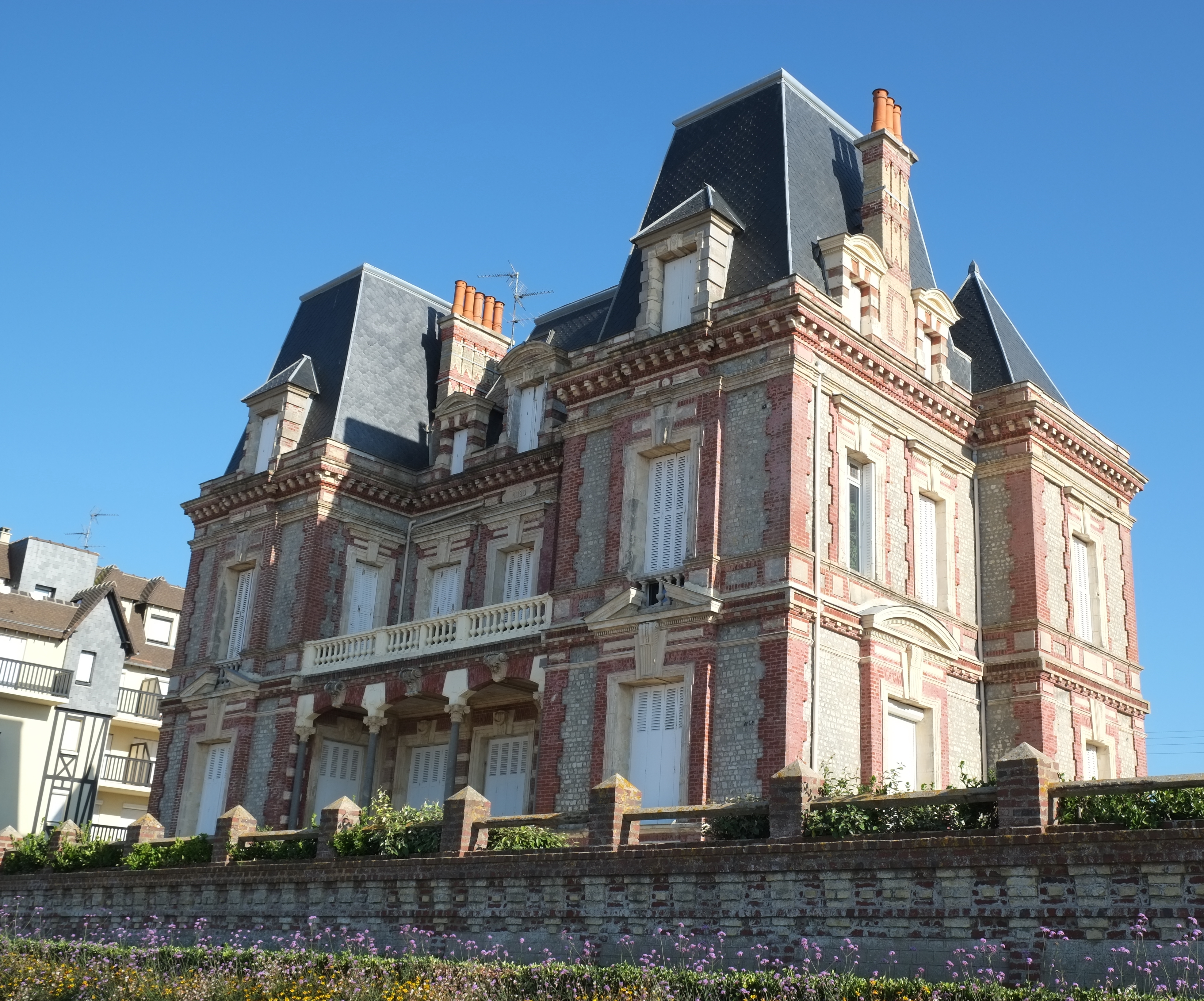 Villa Millet in Cabourg im Département Calvados (Frankreich), Nr. 40 avenue du Maréchal-Foch